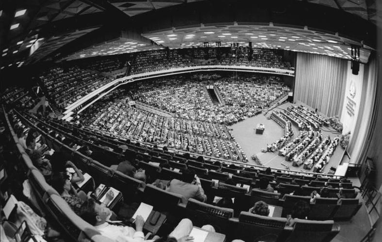 ADN-ZB Grimm-15.6.89 Berlin: IX. Pädagogischer Kongreß-Vom 13. bis 15. Juni tagt im Großen Saal des Palastes der Republik der IX. Pädagogische Kongreß. Rund 4.300 Lehrer, Erzieher, Schulfunktionäre, Freundschaftspionierleiter, Wissenschaftler und Vertreter des gesellschaftlichen Lebens beraten über die Entwicklung des Bildungswesens bis zum Jahre 2.000.